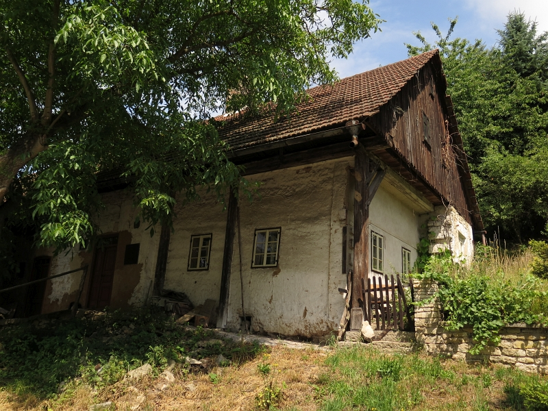 Dům čp. 10, Voděrady 10, Voděrady (okres Ústí nad Orlicí).